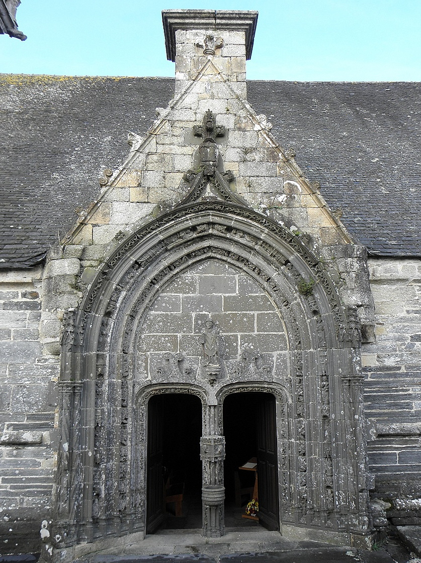 Porche sud de l'église Saint-Yves de La Roche-Maurice (29). .